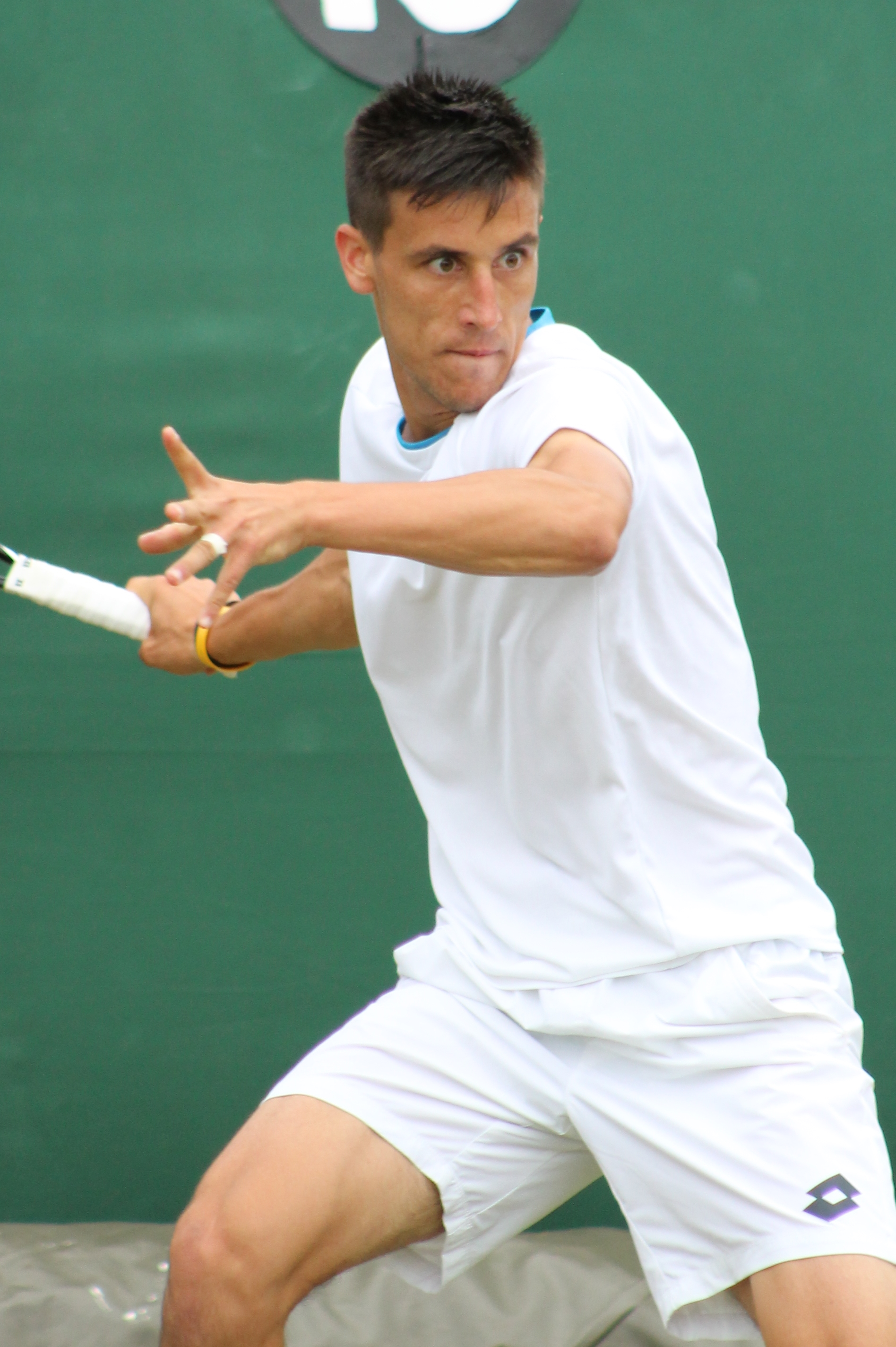 Dzumhur WMQ14 (6)